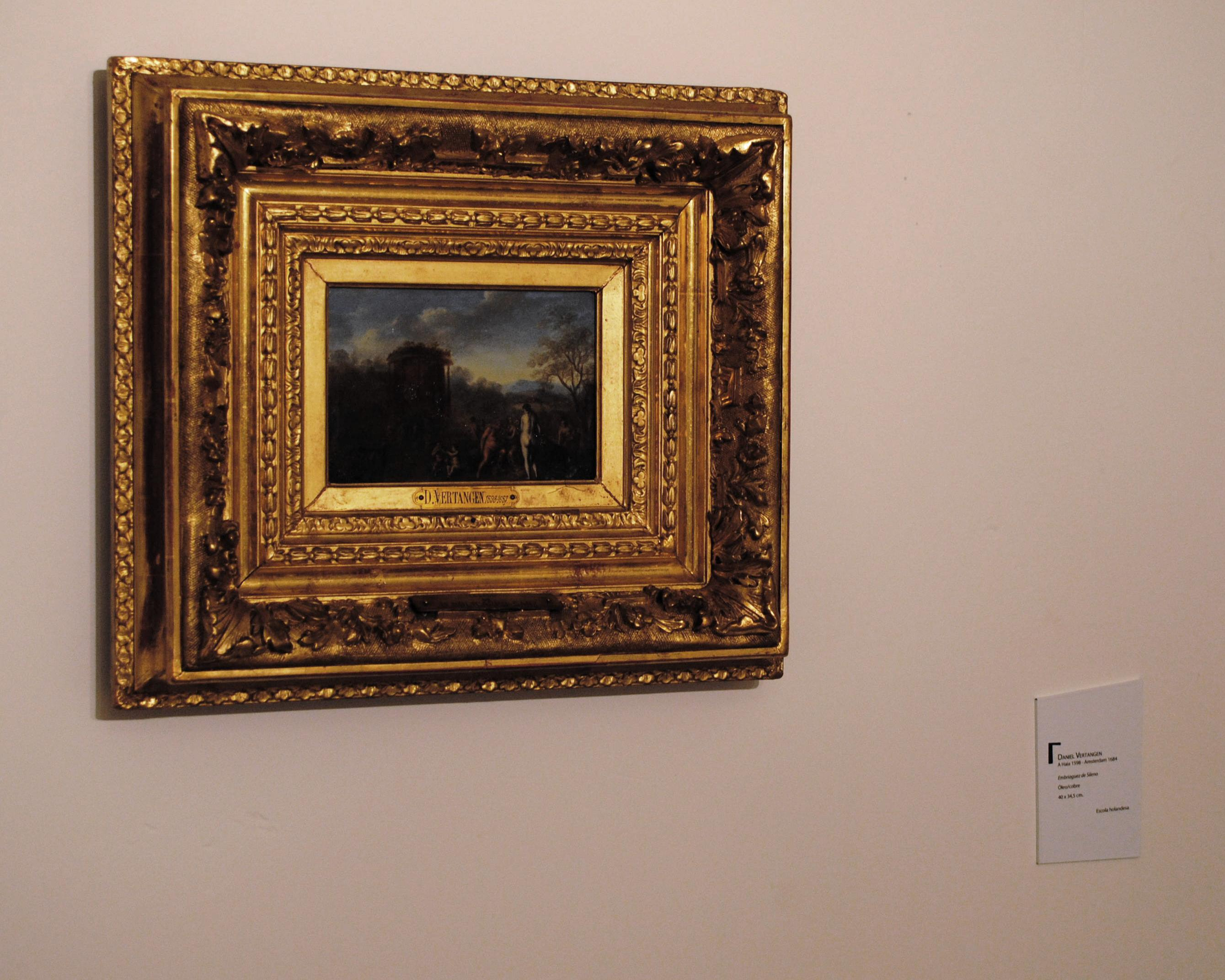 Vexa o título e as categorías.